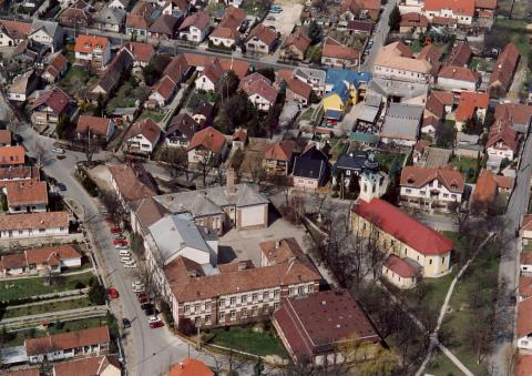 Pilisvörösvár, Hungary, aerialphotography